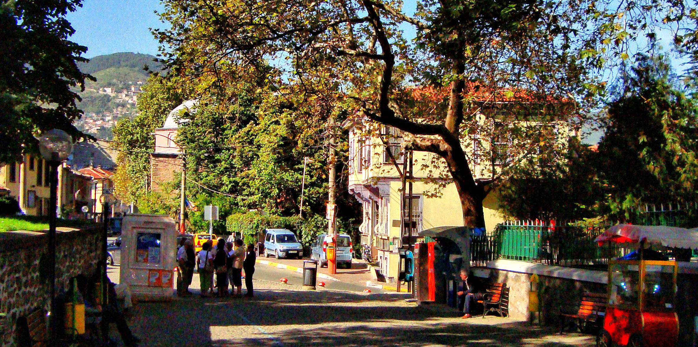 Yeşil camii -Bursa